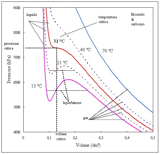 Questo grafico pressione-volume rappresenta le isoterme relative al biossido di carbonio in prossimità del punto di liquefazione. Le curve sono state calcolate utilizzando la legge di Van der Waals ed il grafico è stato realizzato in Excel. L'autore del grafico ha anche effettuato l'upload dell'immagine (non ci sono quindi problemi relativamente al copyright)